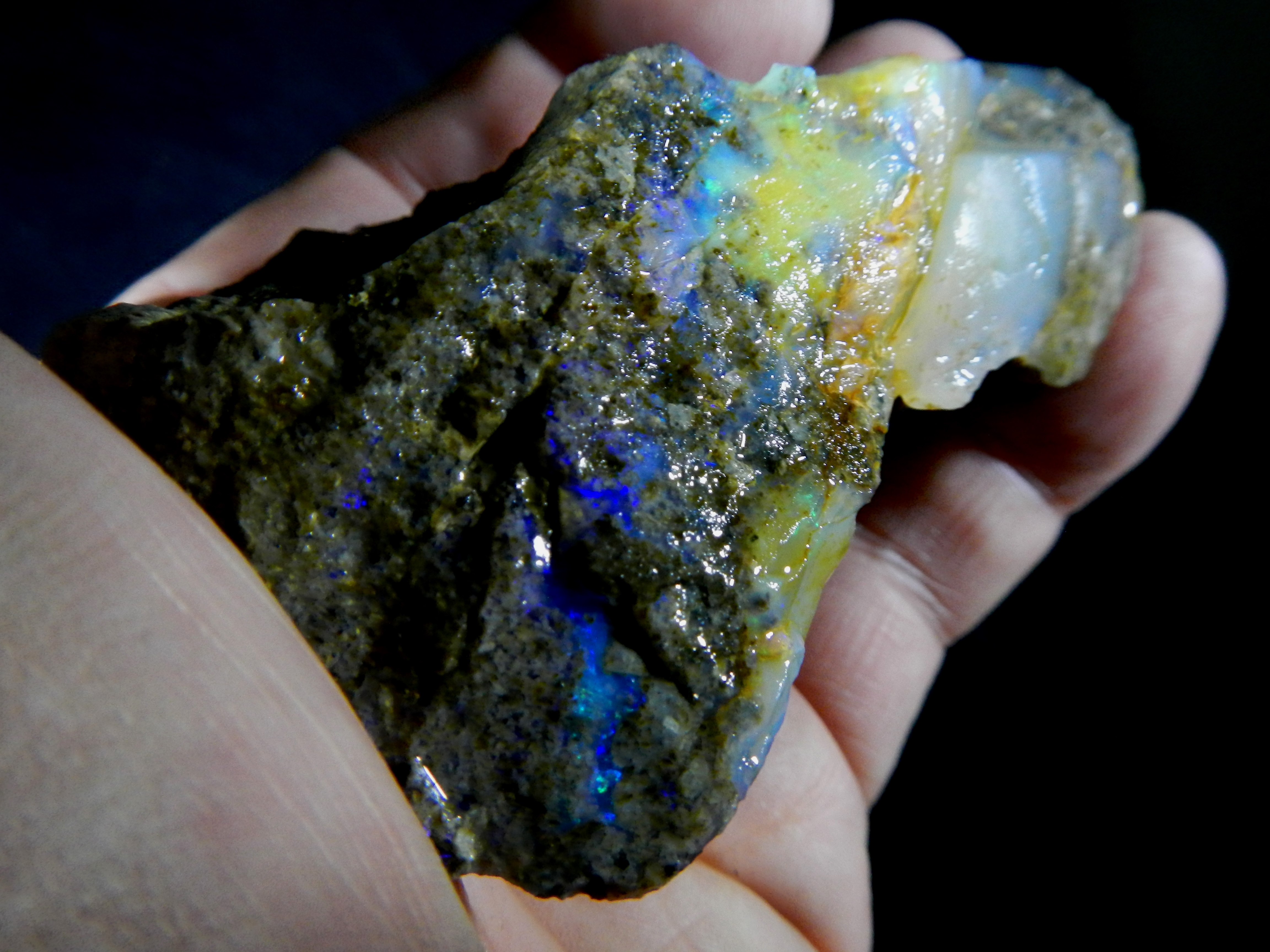 Slovenský opál